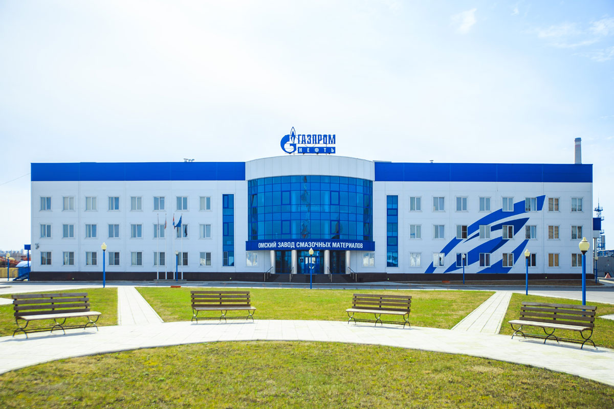 Омский завод смазочных материалов. Фото с официального сайта ООО "Газпромнефть - Смазочные материалы", иллюстрирующее деятельность компании.